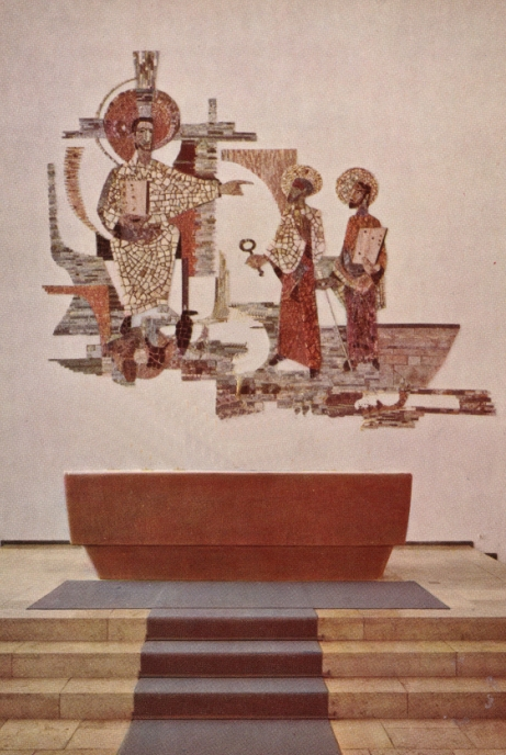 St. Peter und Paul Obernau - Altar